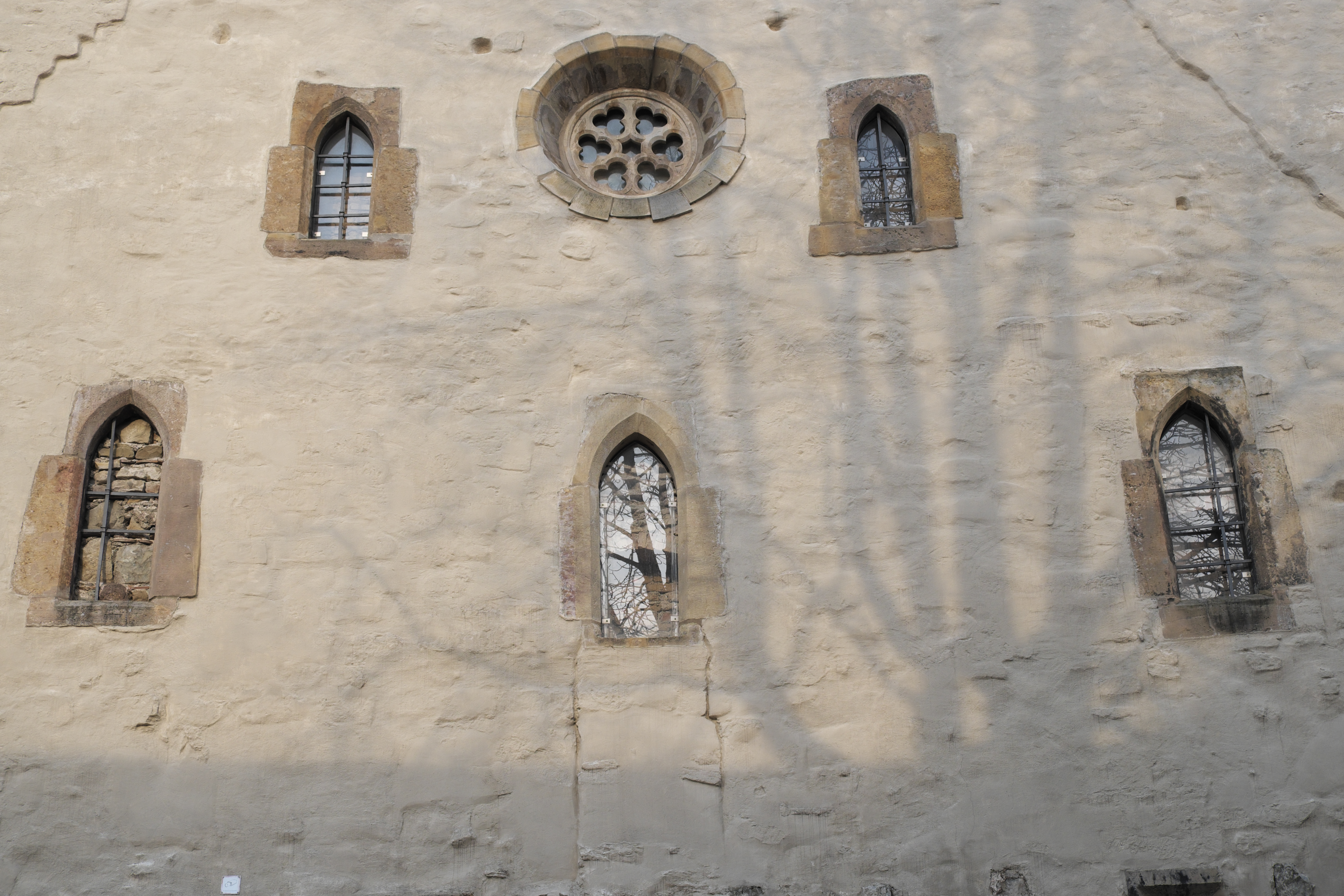 Alte Synagoge in der Waagegasse 8 in der Altstadt in Erfurt (Thüringen/Deutschland)